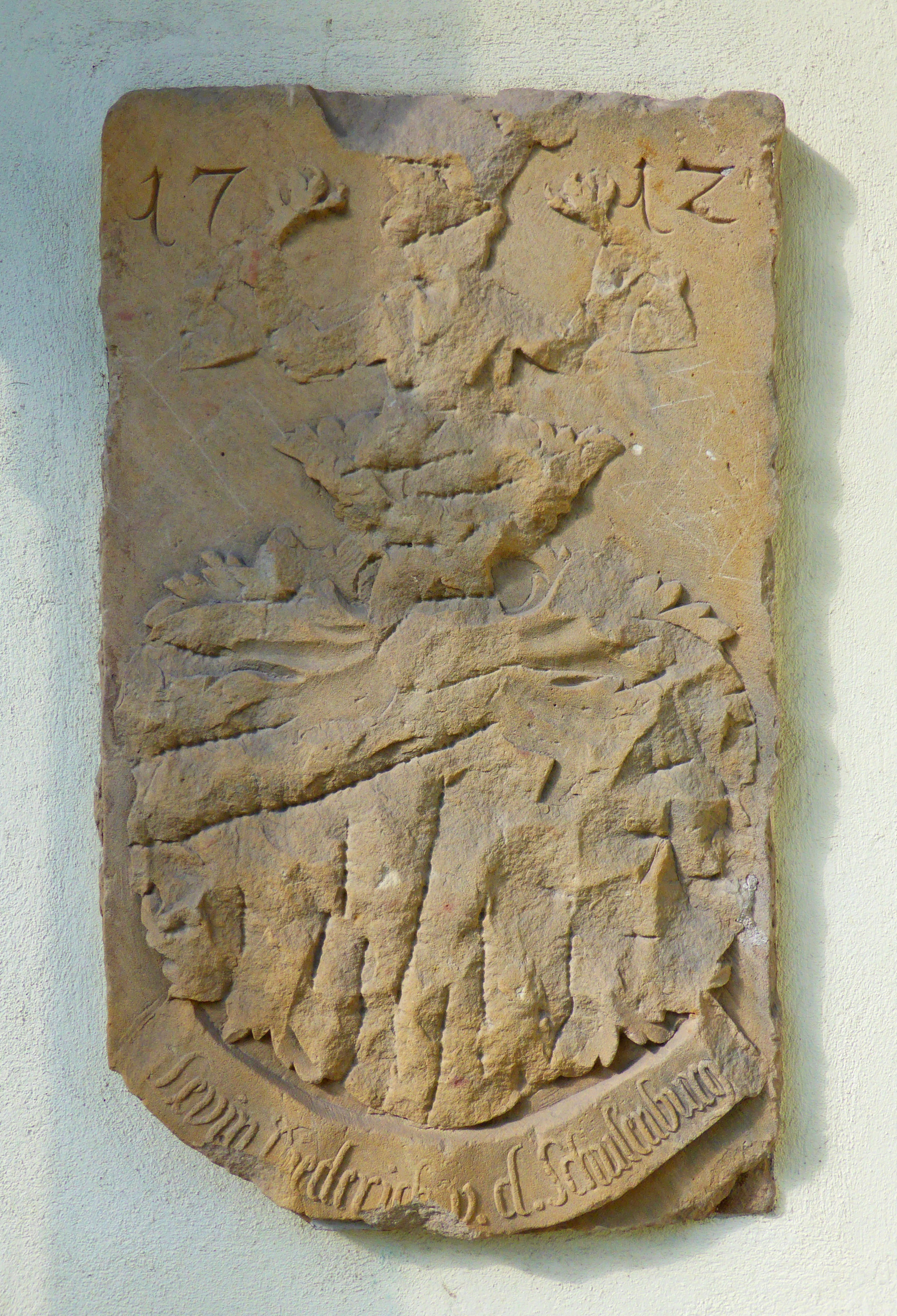 Relief zu Levin Diederich von der Schulenburg (1678-1743) am Eingangstorbogen des Apenburger Hofes in Beetzendorf.